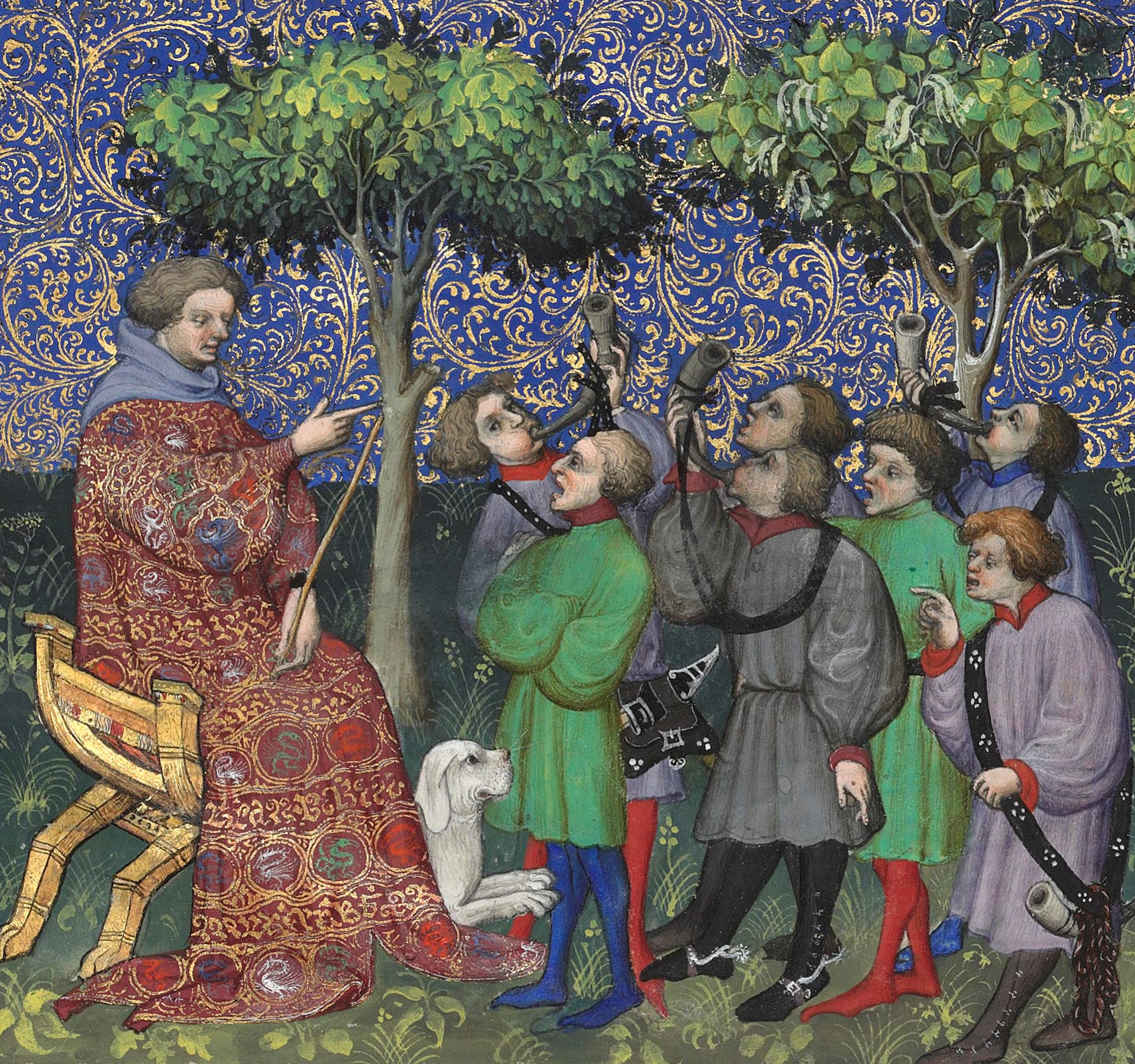 Fébus enseigne à ses veneurs à corner et à huer, page 54 r du Livre de la chasse.